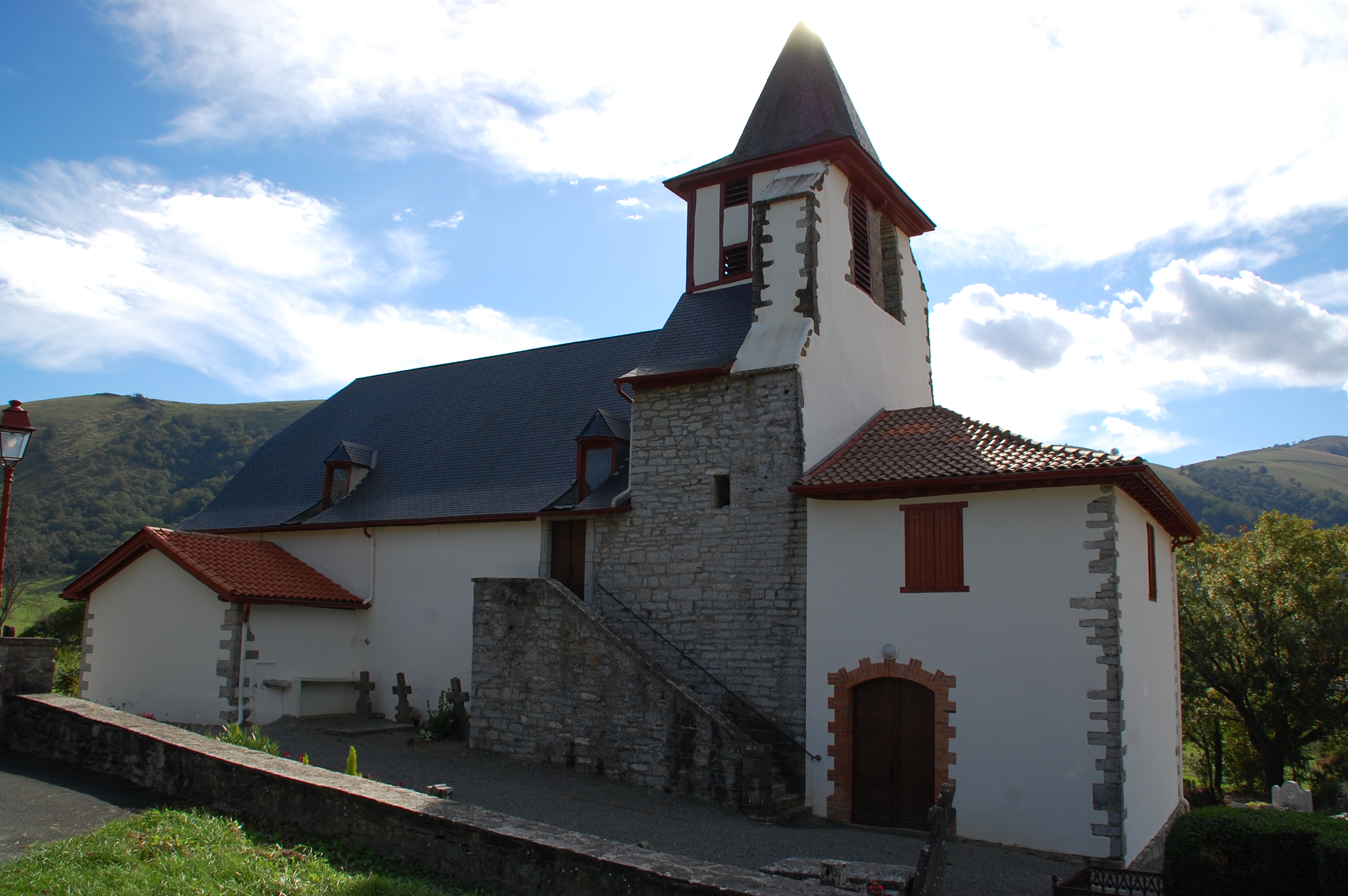 Eglise d'Ibarolle